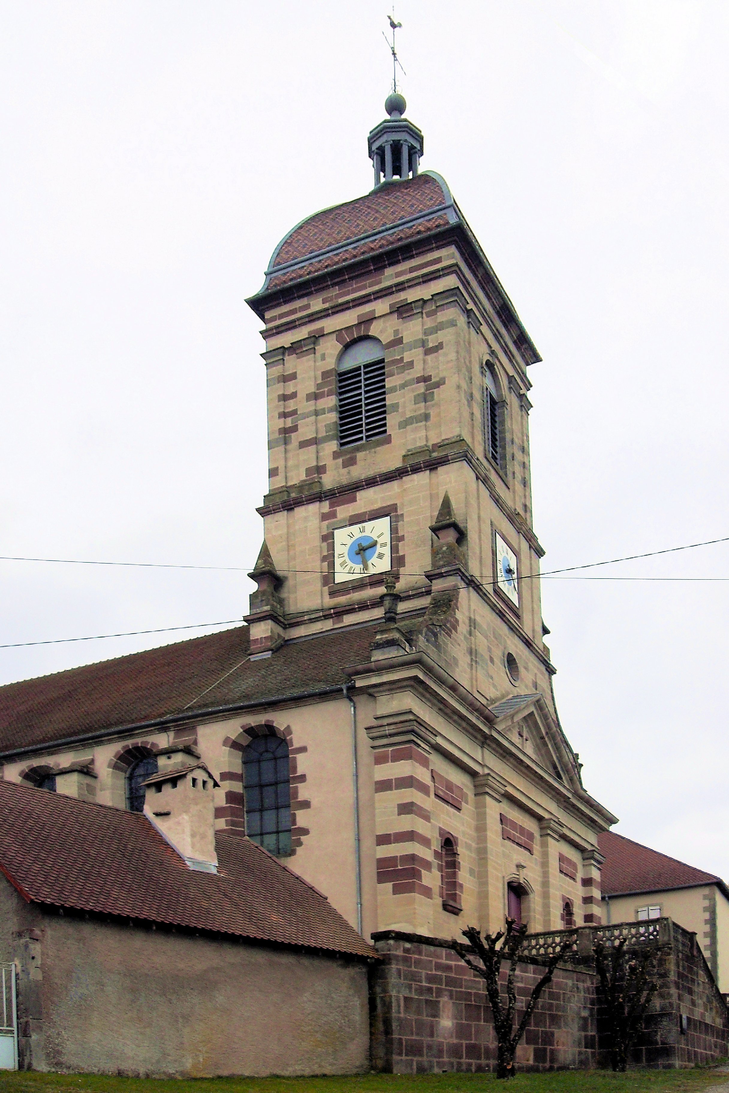 L'église Saint-Pierre-Saint-Paul à Mailleroncourt-Saint-Pancras